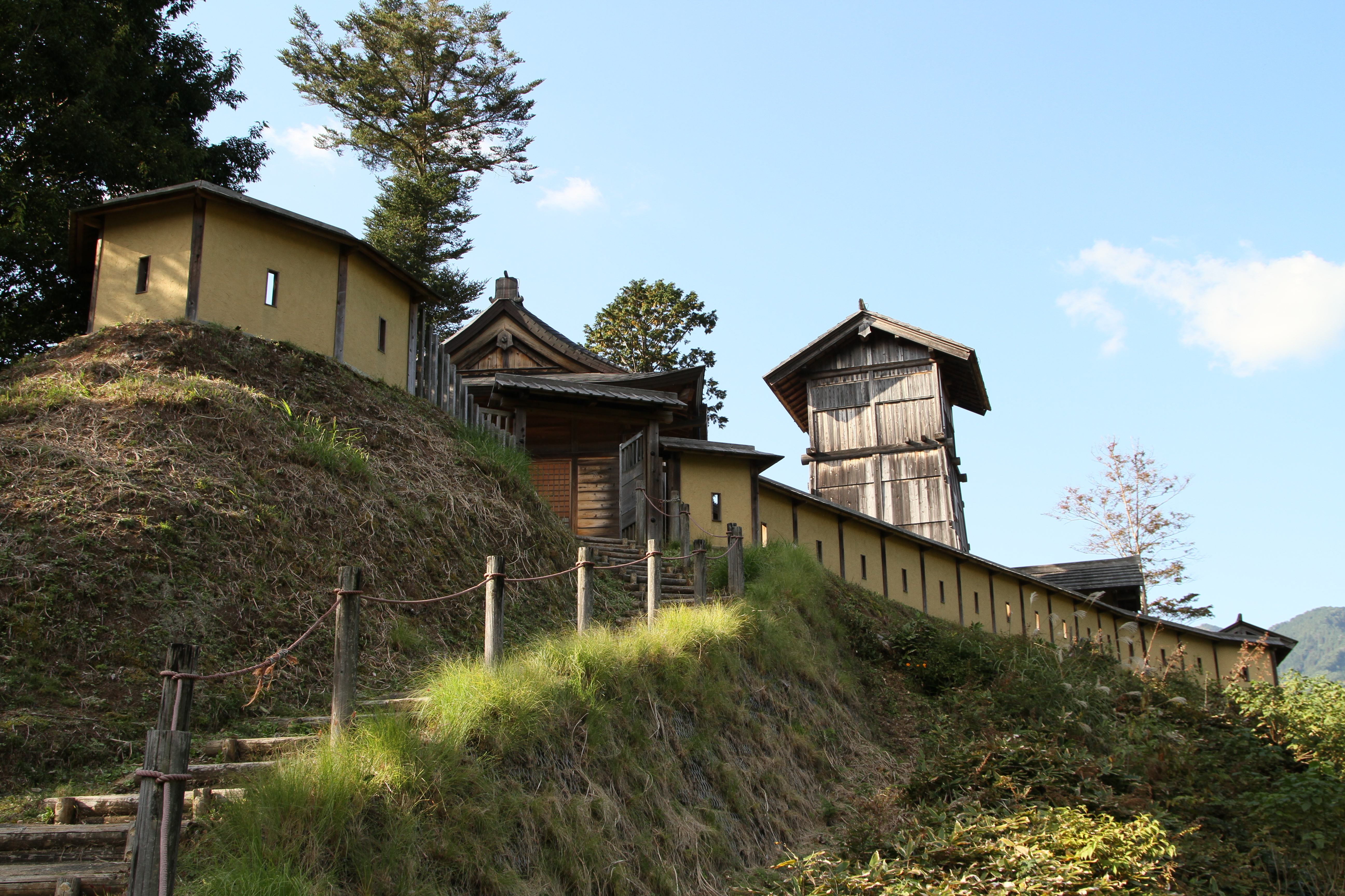 復元された高根城（浜松市天竜区水窪町）